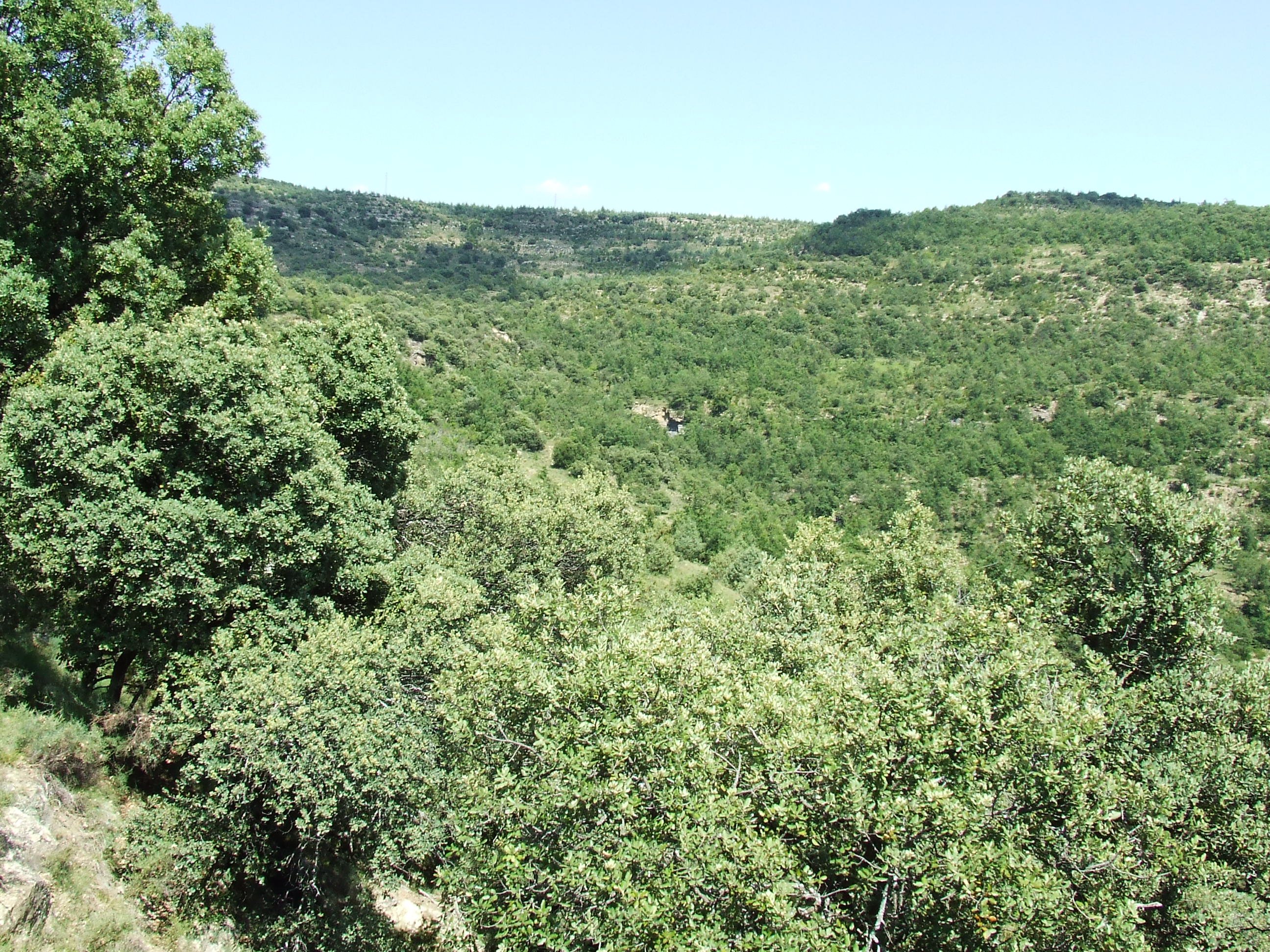 Vedat de la Grisa (Miravet, Mur, Castell de Mur, Pallars Jussà)